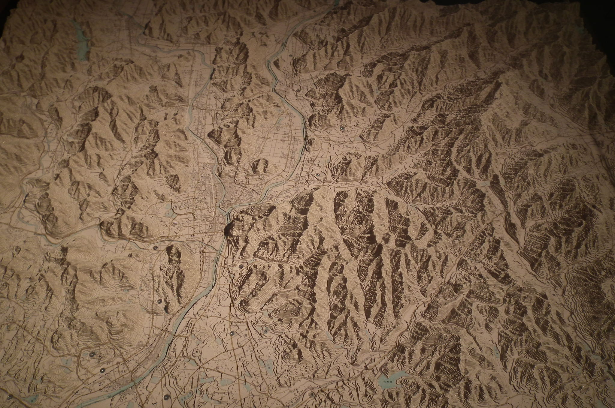 Nishiwaki-city Model of geographical features 西脇市地形模型